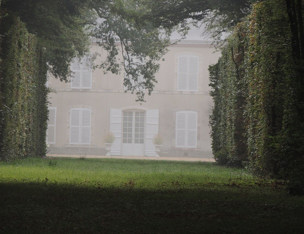 Château, jardin et parc de Villeprévost; facade arrière et grande perspective du parc avec grands bosquets taillés à la verticale des 2 côtés; des branches en haut; et en bas, alternance lumières et ombres dans la pelouse